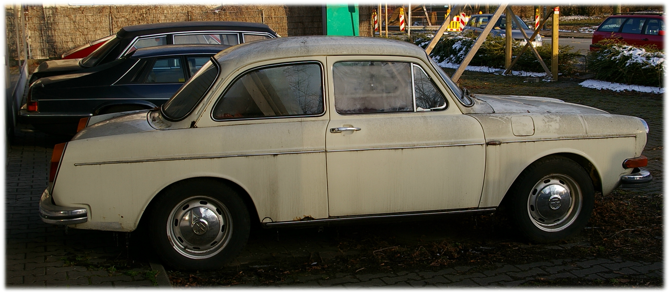 VW 1600 Limousine, Bj. 69-72. Eigenes Foto im März 2006.